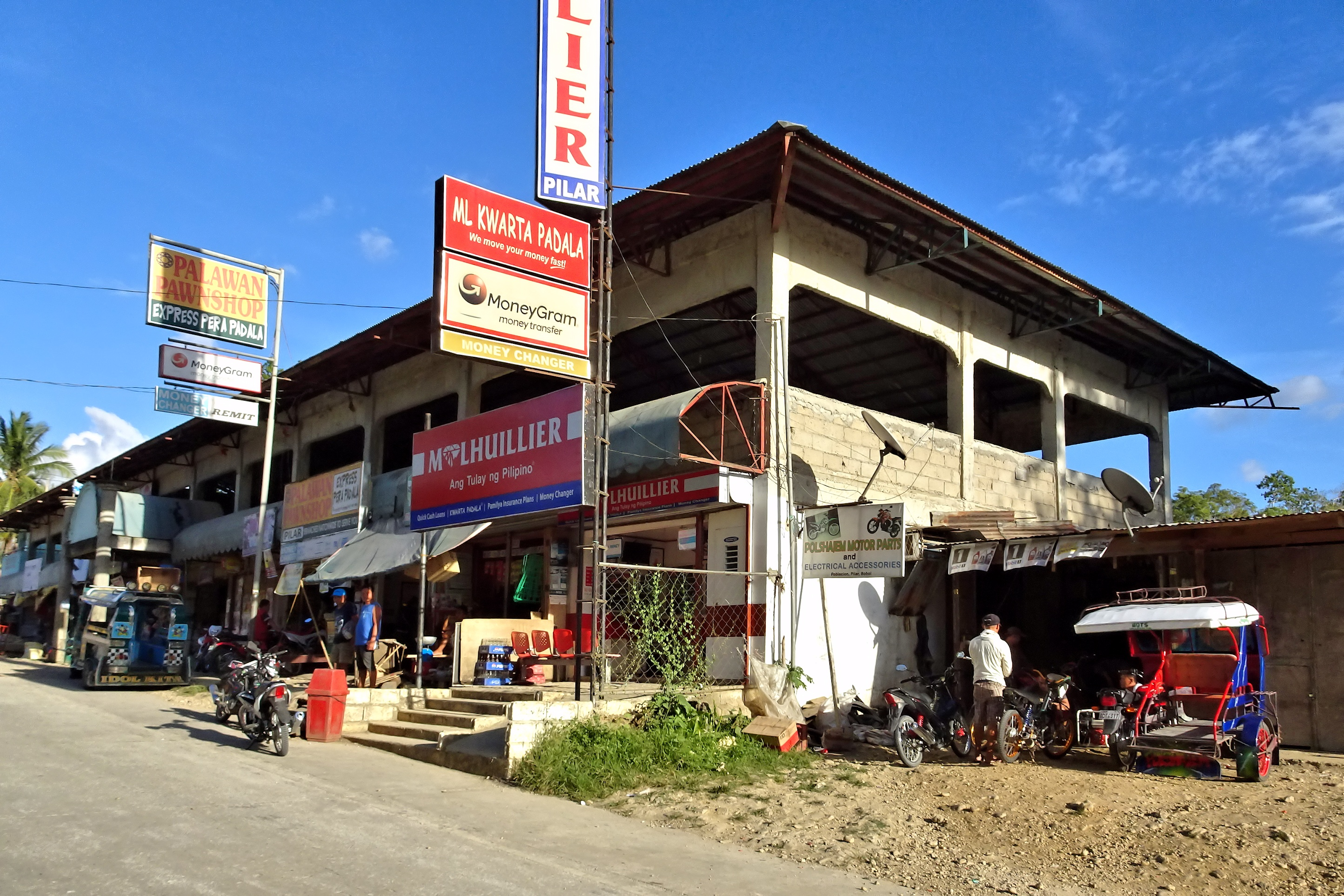 Pilar, Bohol, Philippines